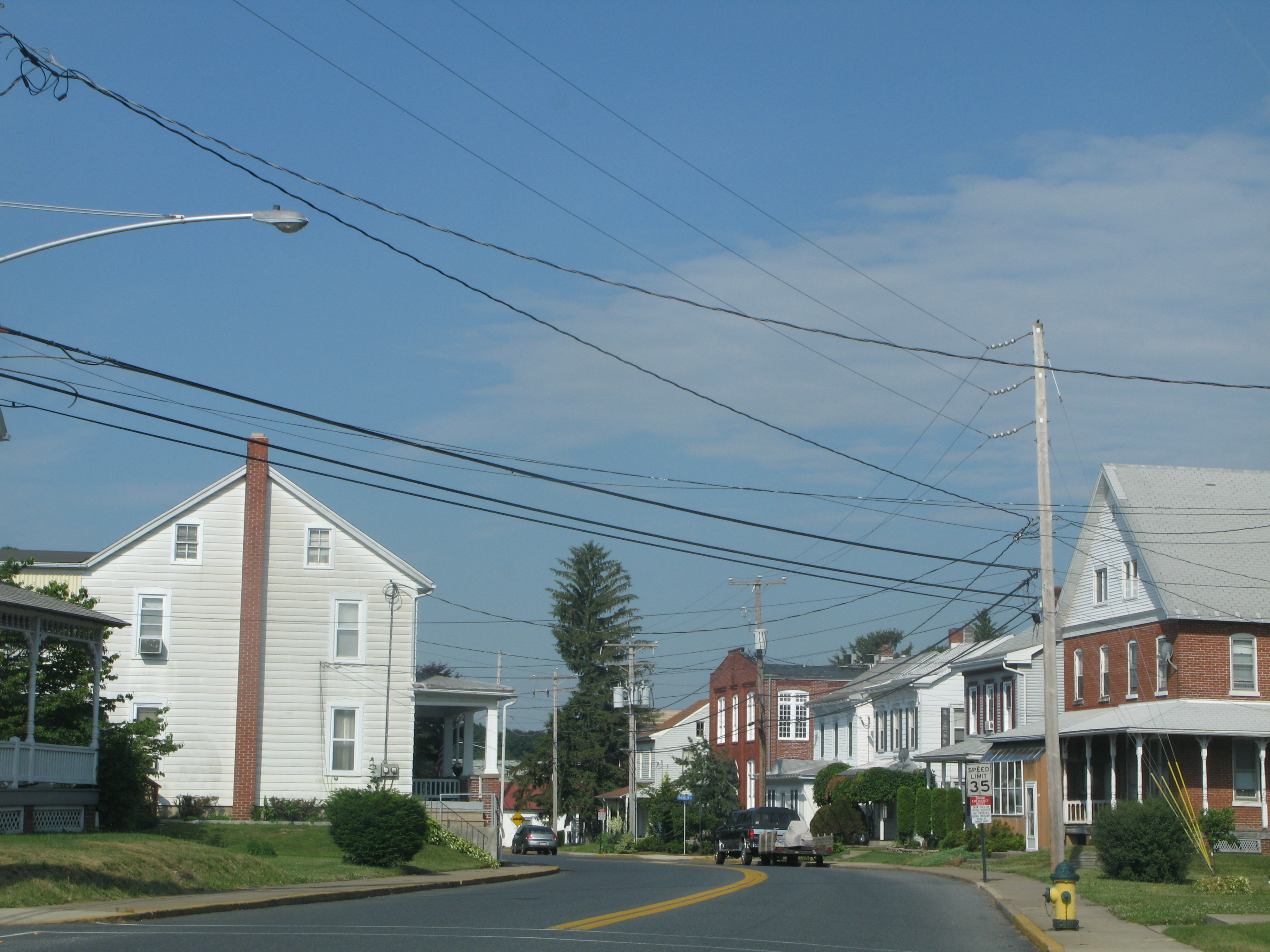 A view of Shoemakersville.